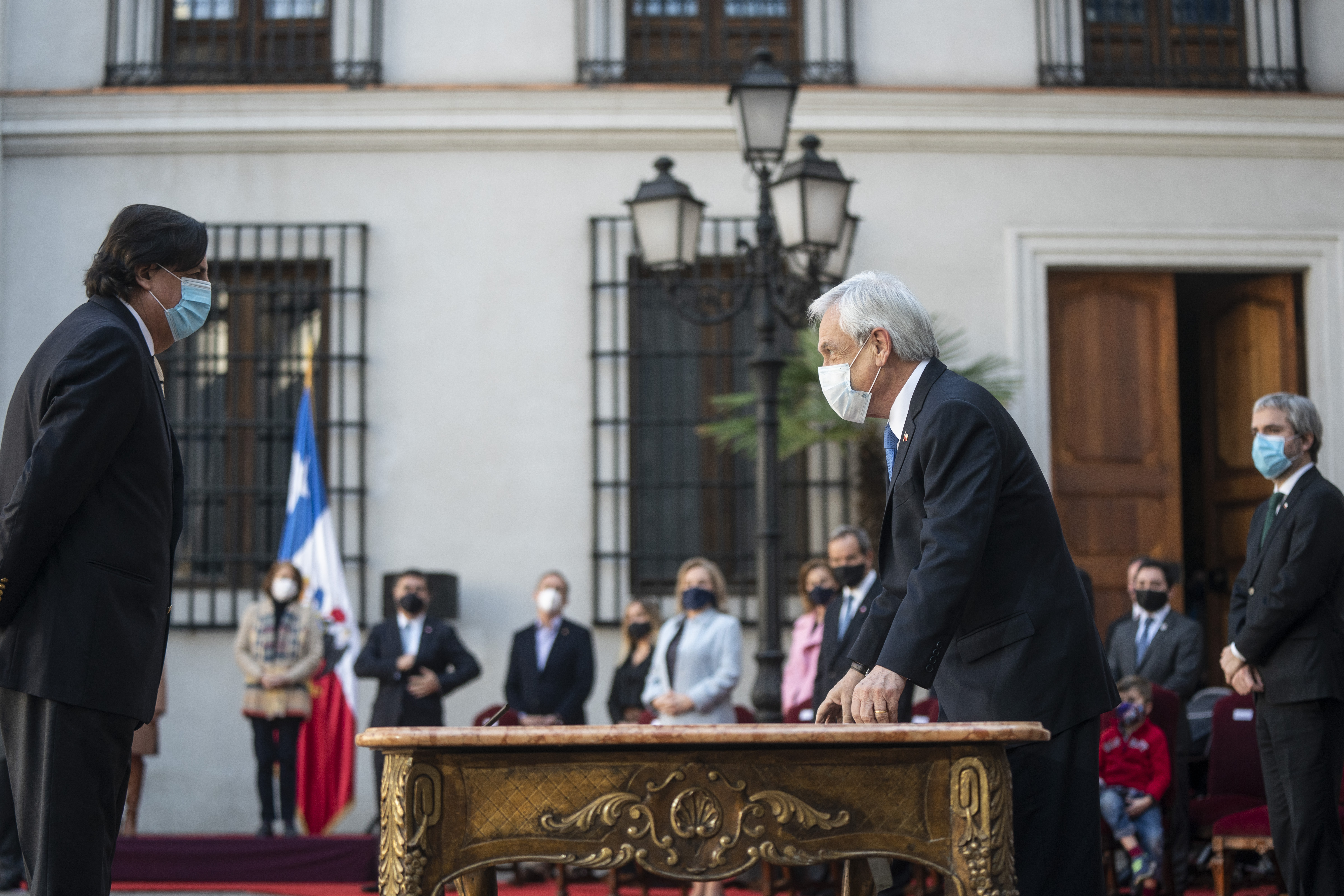 El presidente Sebastián Piñera toma juramento a Víctor Pérez Varela para ser nombrado Ministro del Interior y Seguridad Pública de Chile.